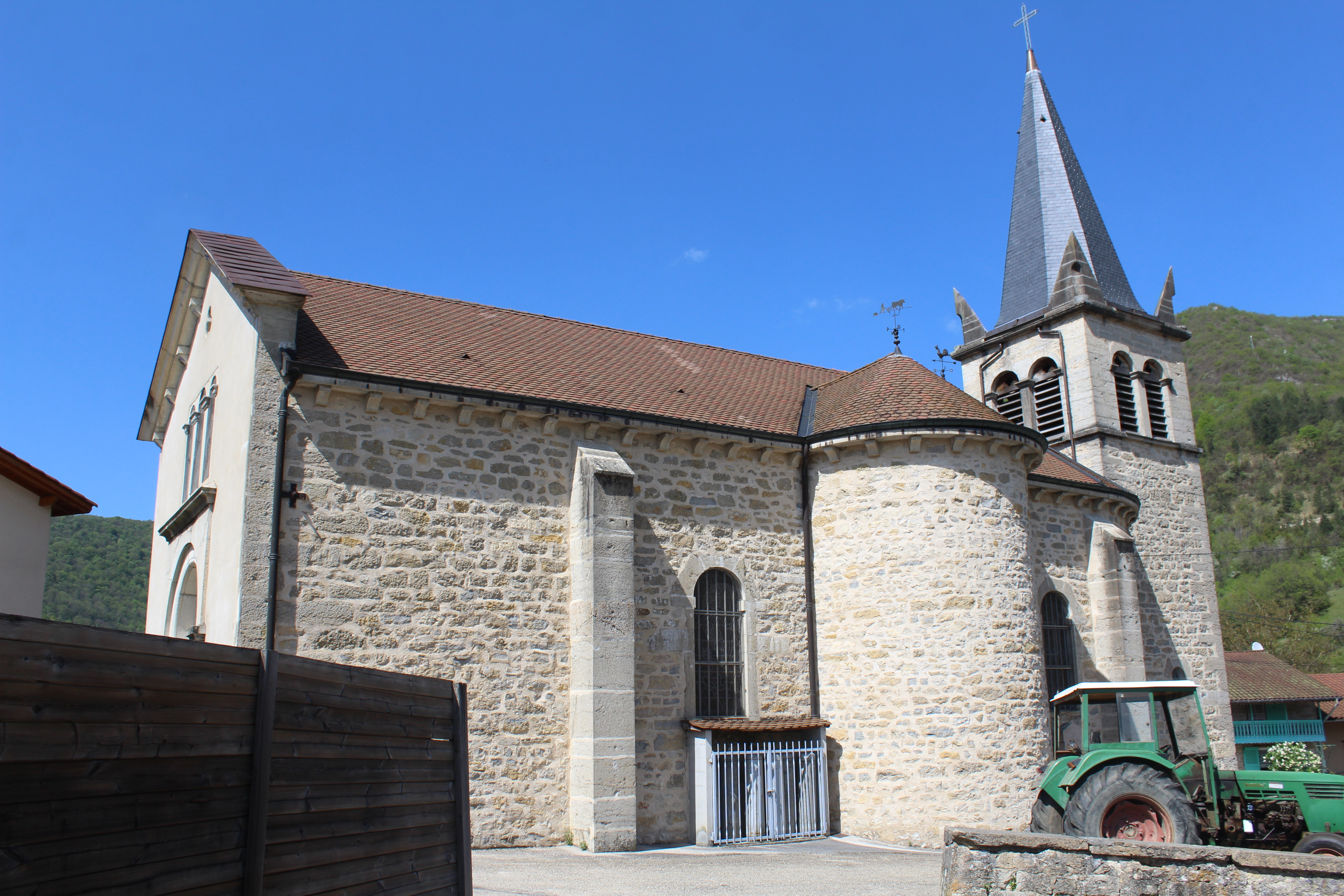 Église Saint-Laurent d'Oncieu.